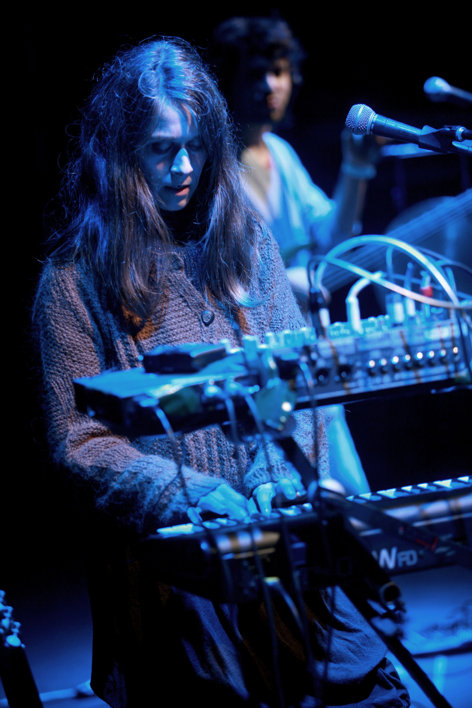 Juana Molina en el festival Ciudad Emergente de 2009